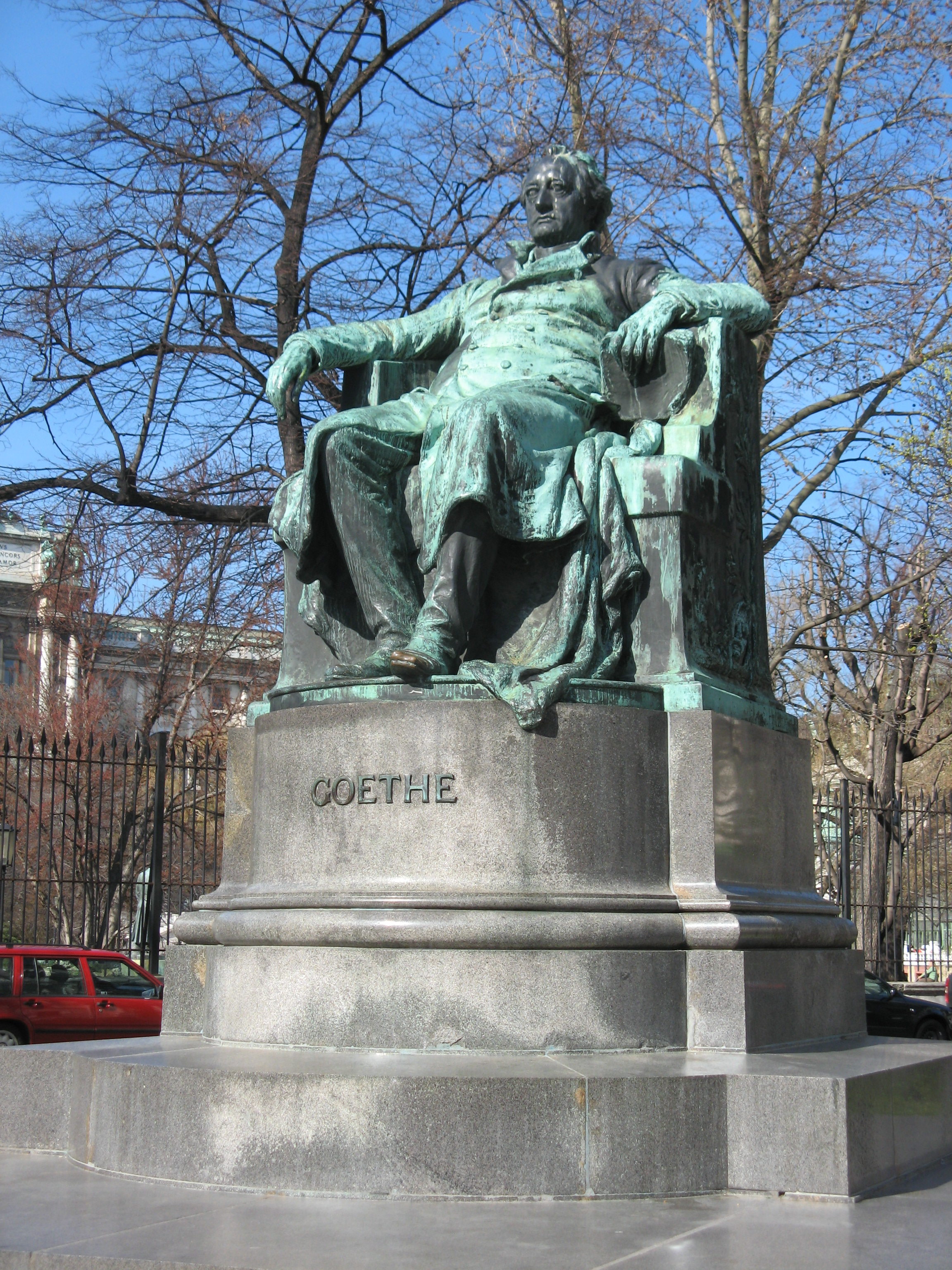 Edmund von Hellmer: Denkmal Johann Wolfgang von Goethe (1900), Bronze, Wien, Opernring